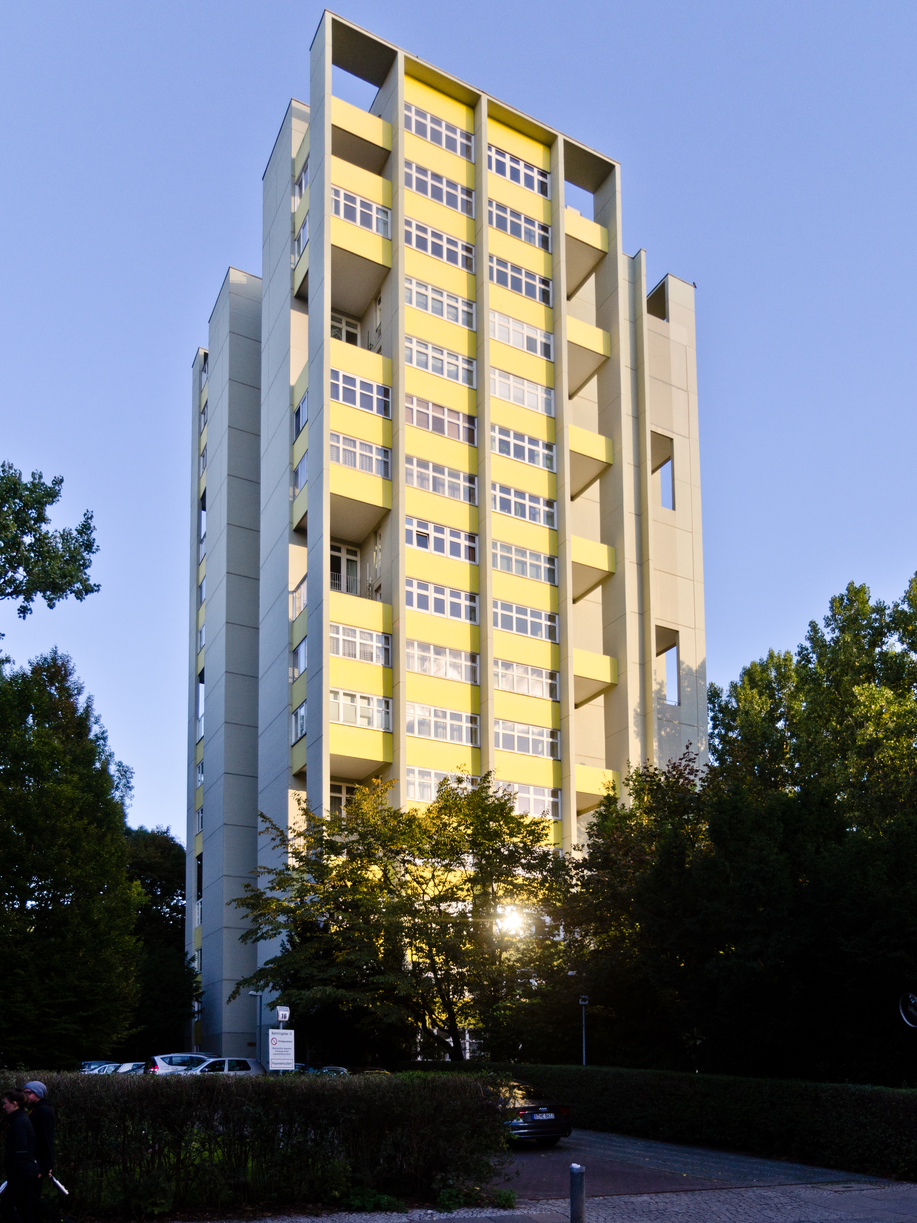 Bartningallee 16, Wohnhaus, 1956–1958 von Hans SchwippertThis is a photograph of an architectural monument.